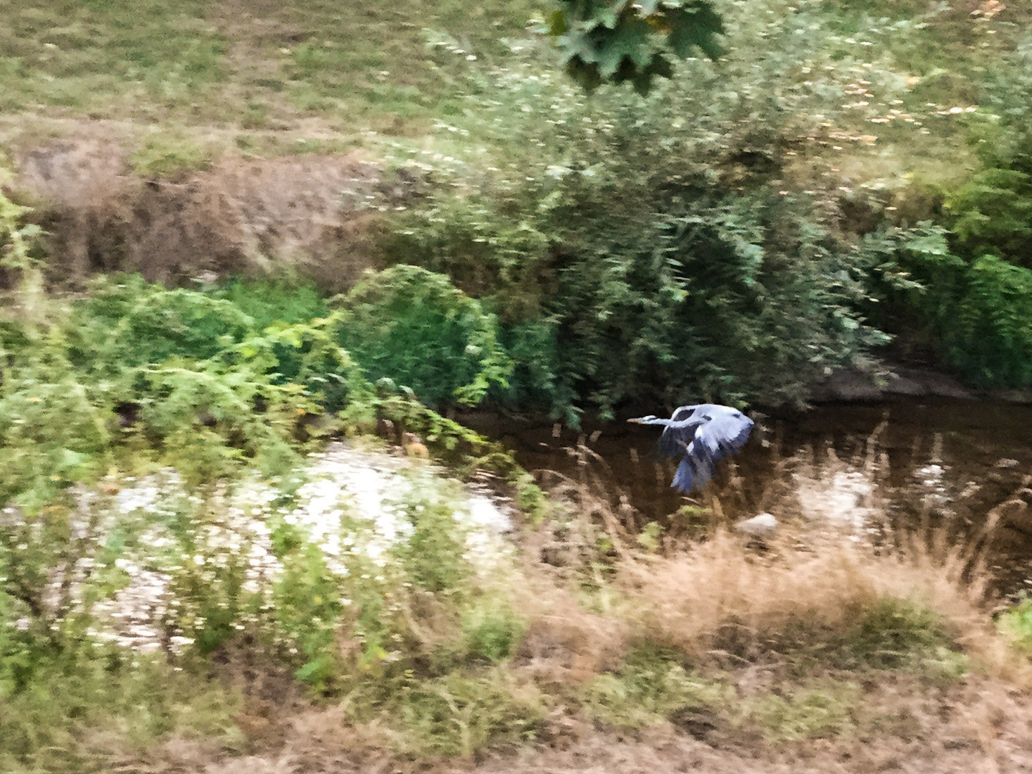 Graureiher im Flug an der Steinlach in Tübingen